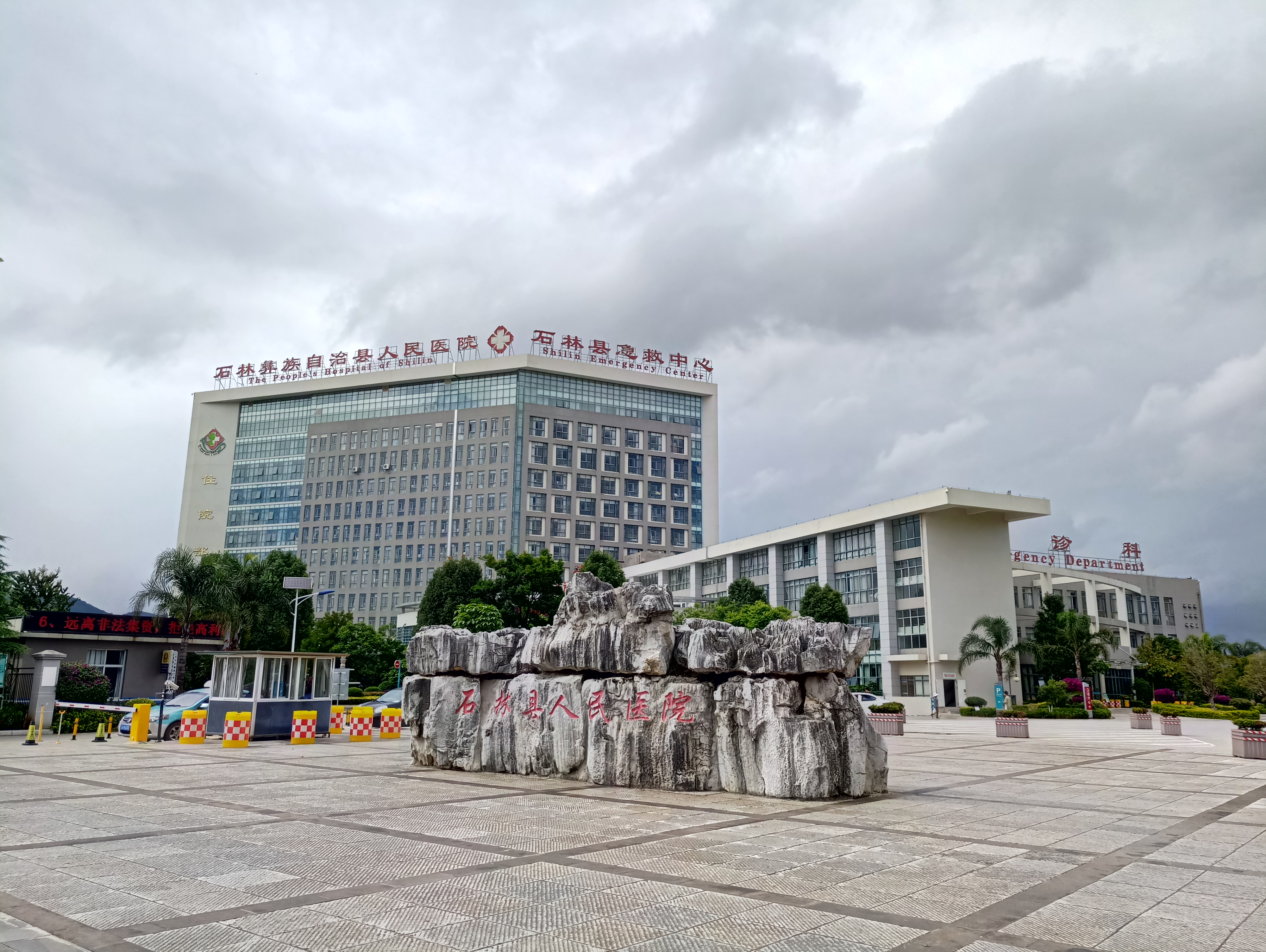 中文（中国大陆）: 石林彝族自治县人民医院